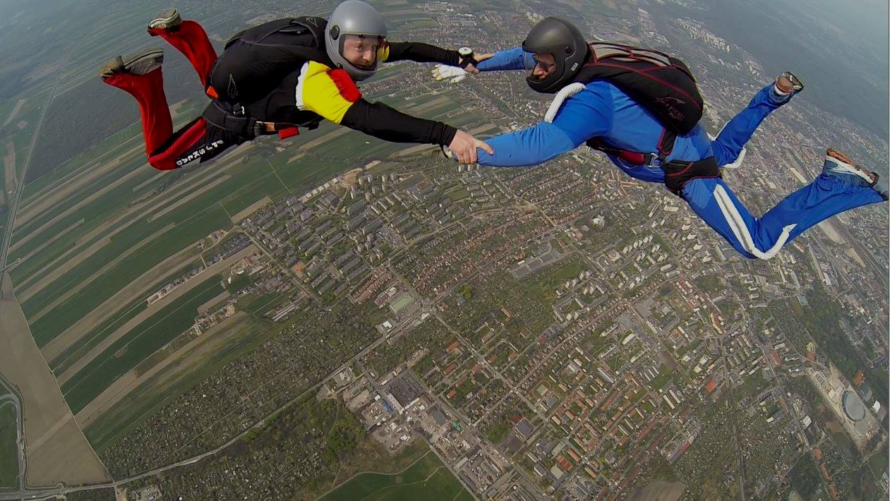 RW-2, Aleksander Piecha i Włodzimierz Karsznia – Sekcja Spadochronowa Aeroklubu Gliwickiego